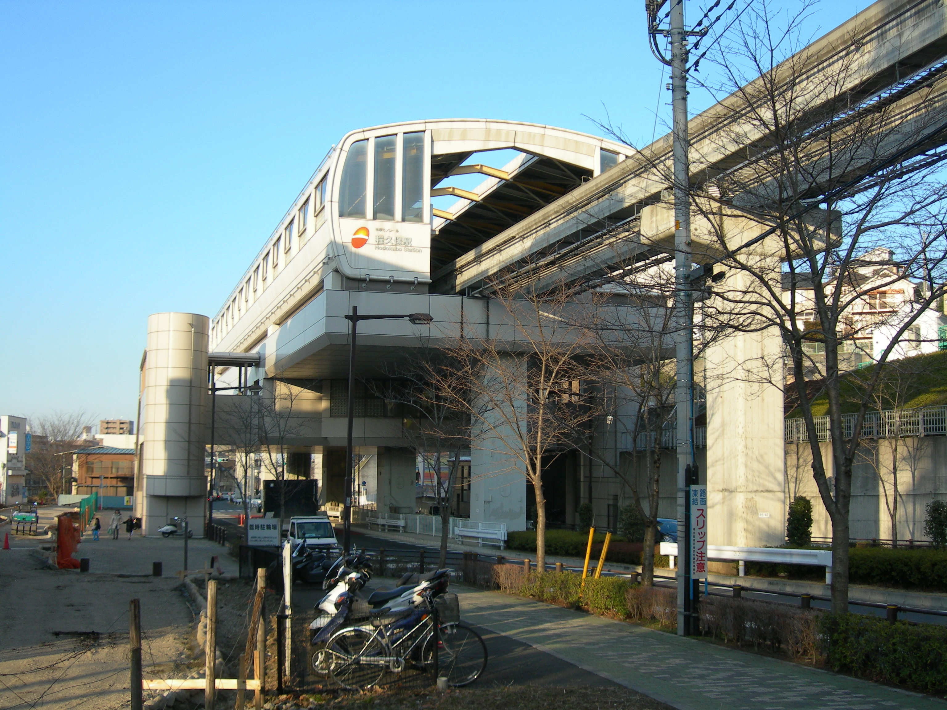 程久保駅